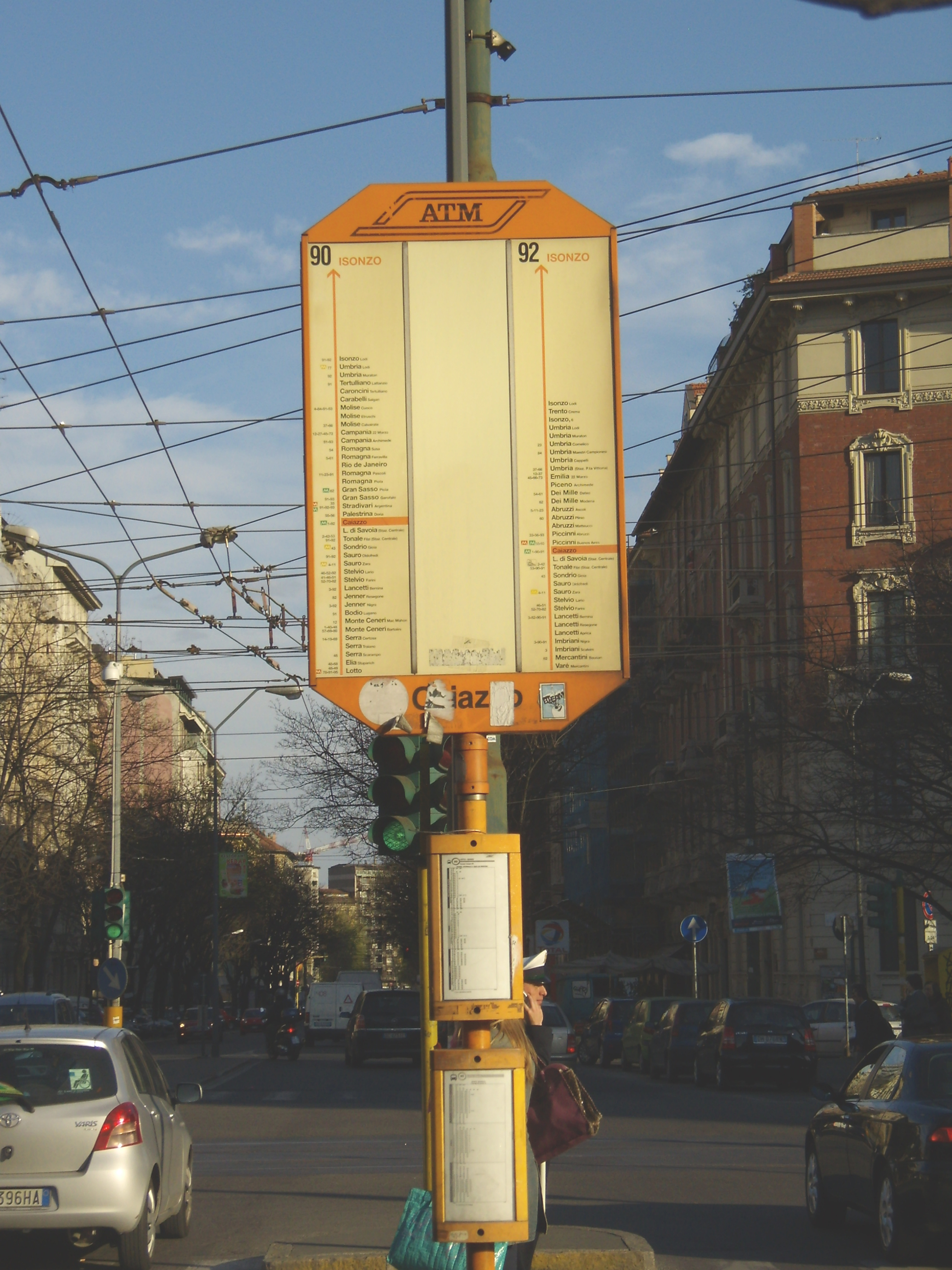 Palina di fermata ATM in piazza Caiazzo a Milano.